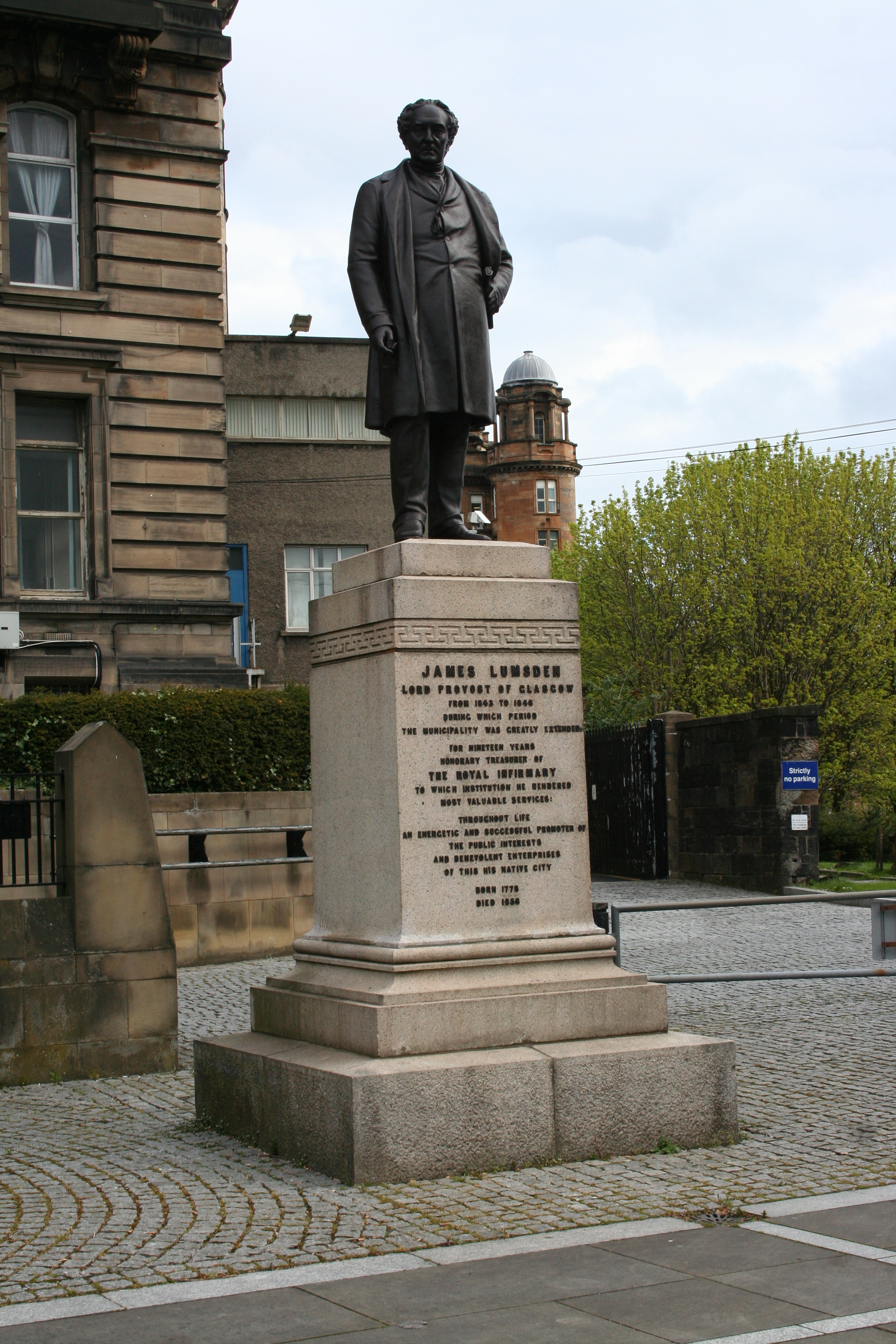 Cathedral Square Glasgow, statue of James Lumsden (Mehr Informationen).